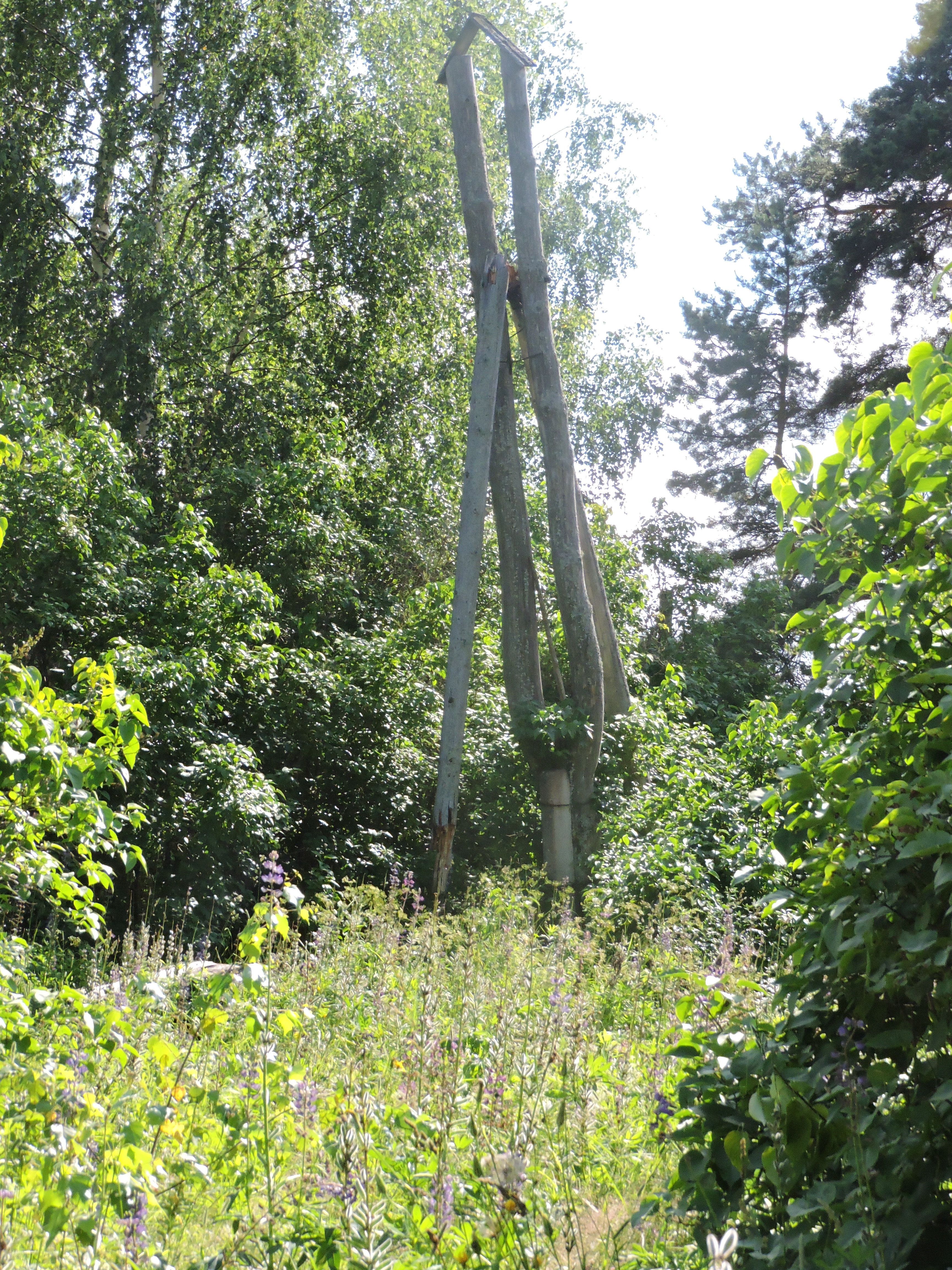 Колодезные журавли по своей природе являются громоздкой конструкцией, а потому обычно не подлежат ремонту, т.к. с годами гниют и разрушаются. В этом случае либо ставят новый журавль, либо ворот